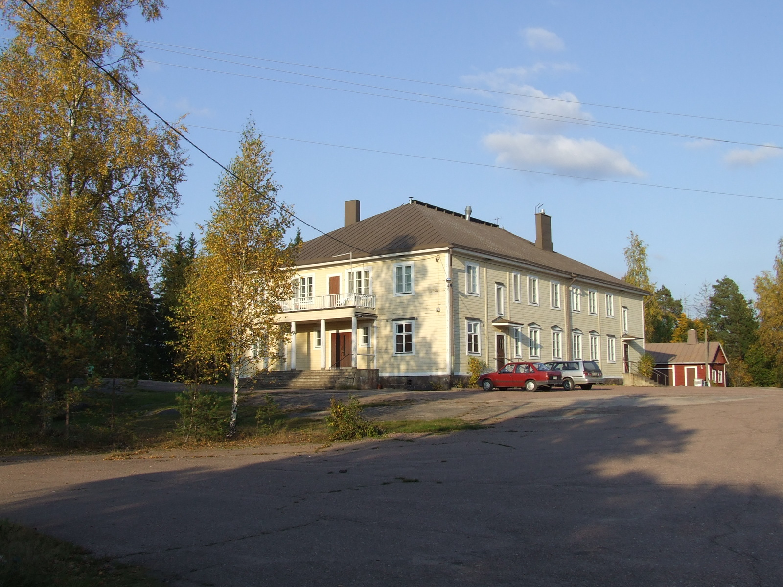 Vehkalinna Haminassa